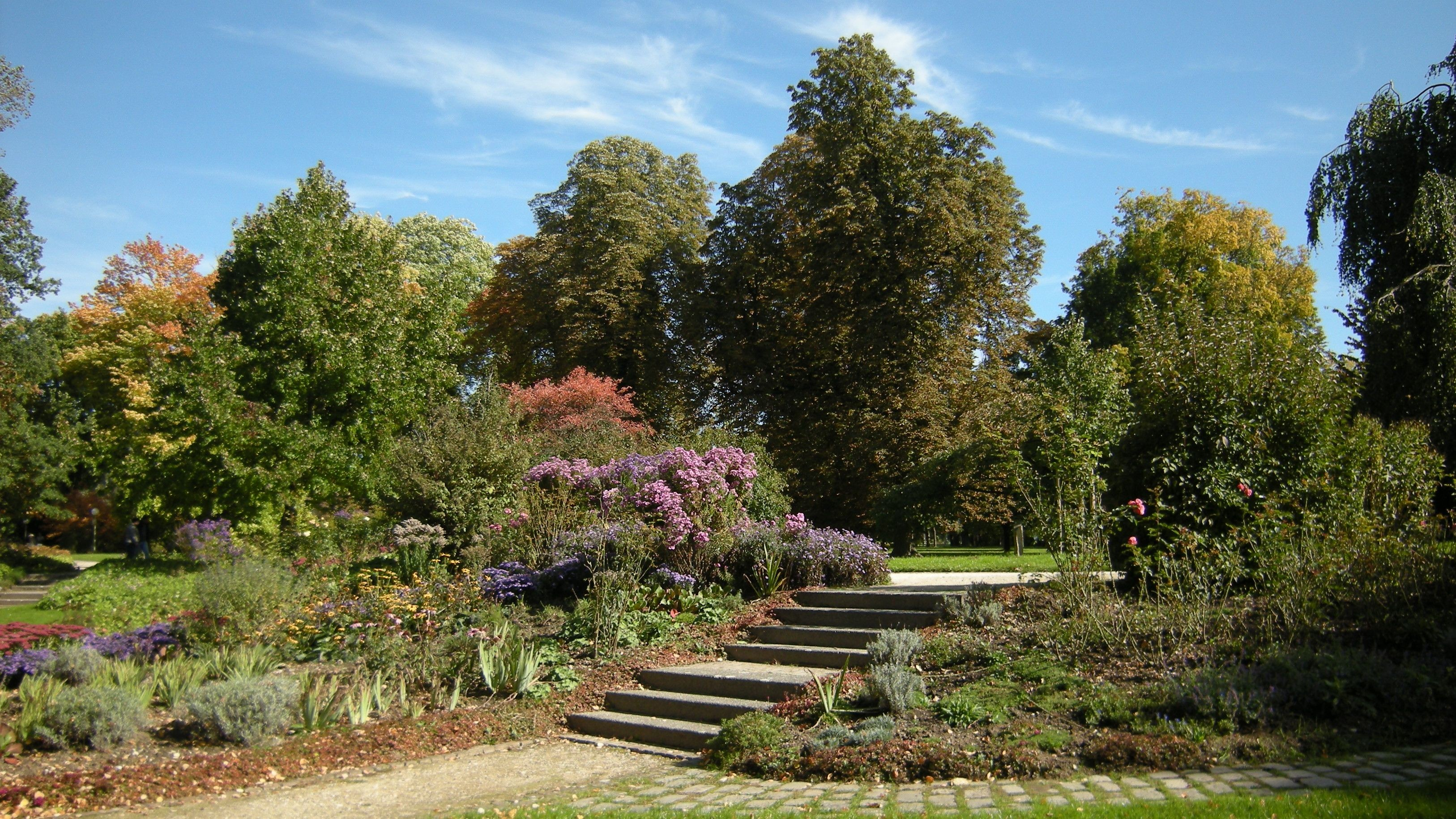 Ulm - Friedrichsau